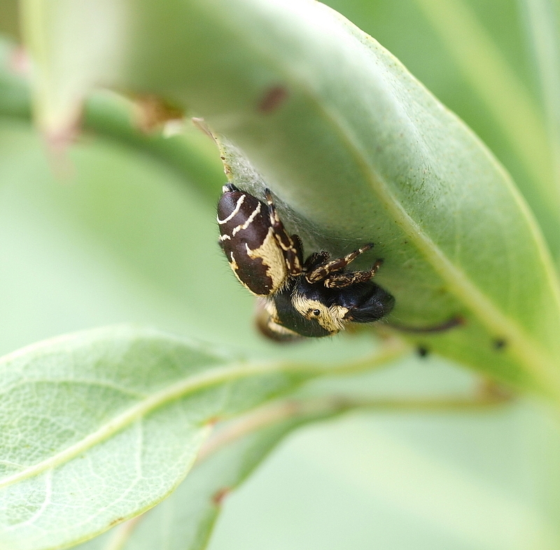 Karasu Haetori (Jumping Spider) Rhene atrata (Karsch, 1881)